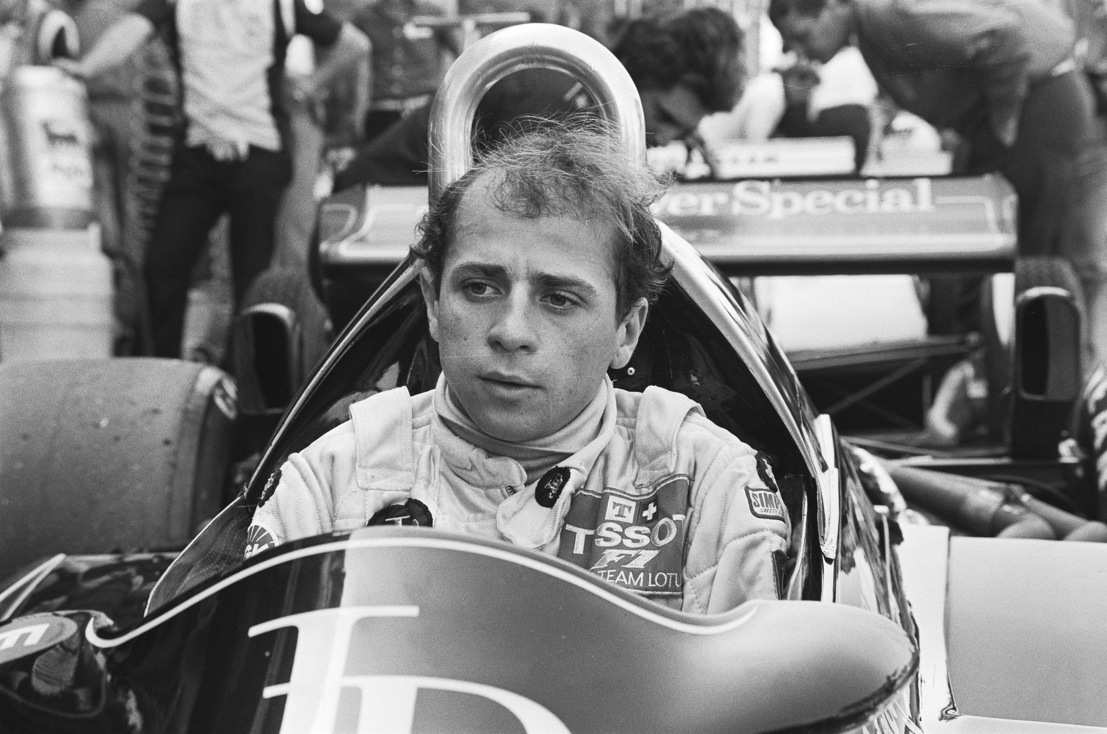 Grand Pris van Nederland te Zandvoort; koppen coureurs, Roberto Moreno.